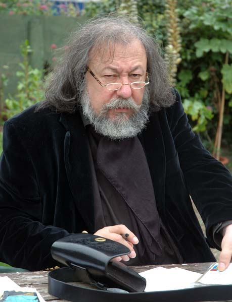 Pierre Dubois écrivain elficologue, en train de prendre des notes sur son carnet.